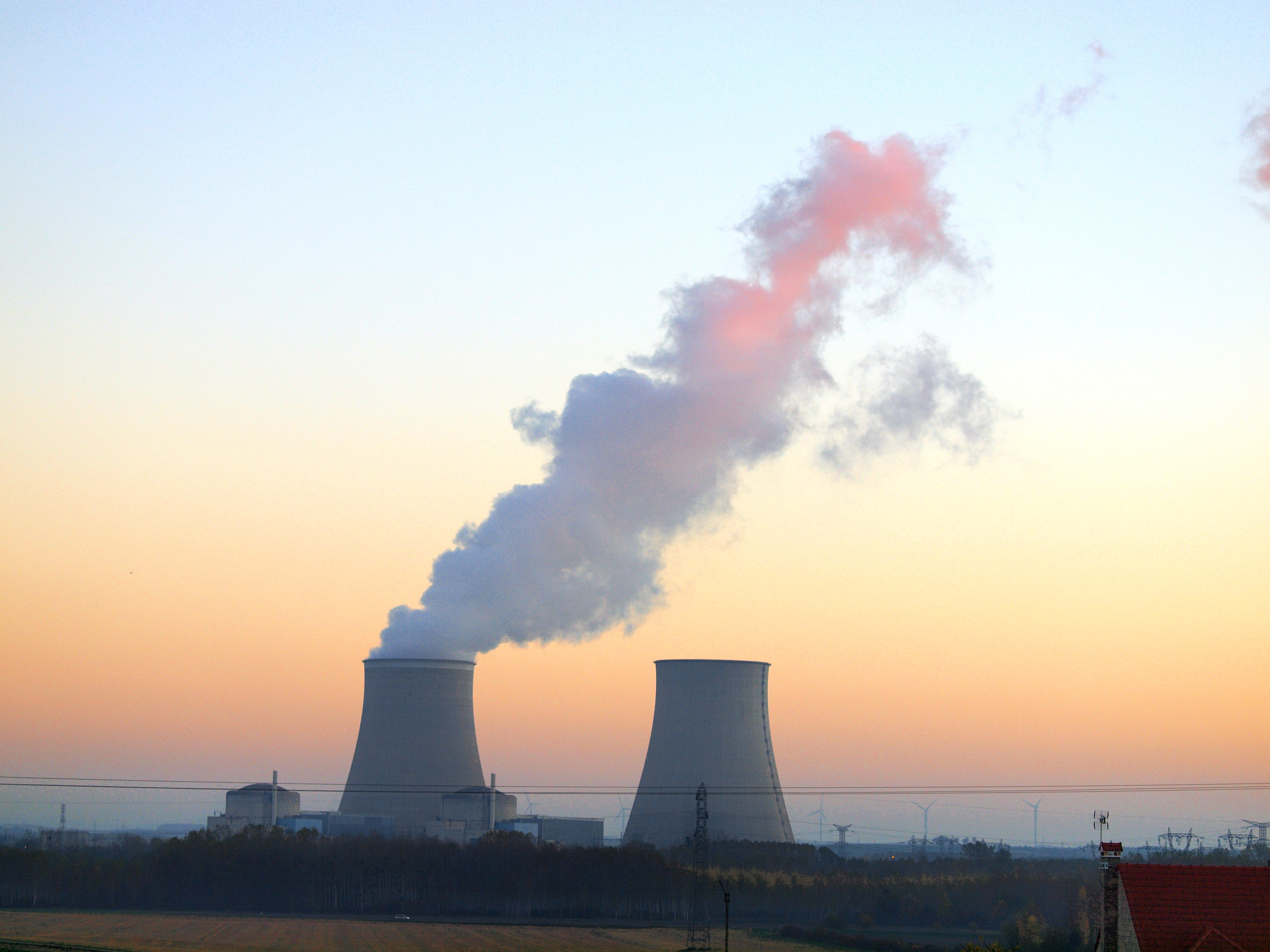 Centrale électro-nucléaire de Nogent-sur-Seine, qui joue avec le soleil, le soir, alors que les capteurs solaires sont à l'arrêt.